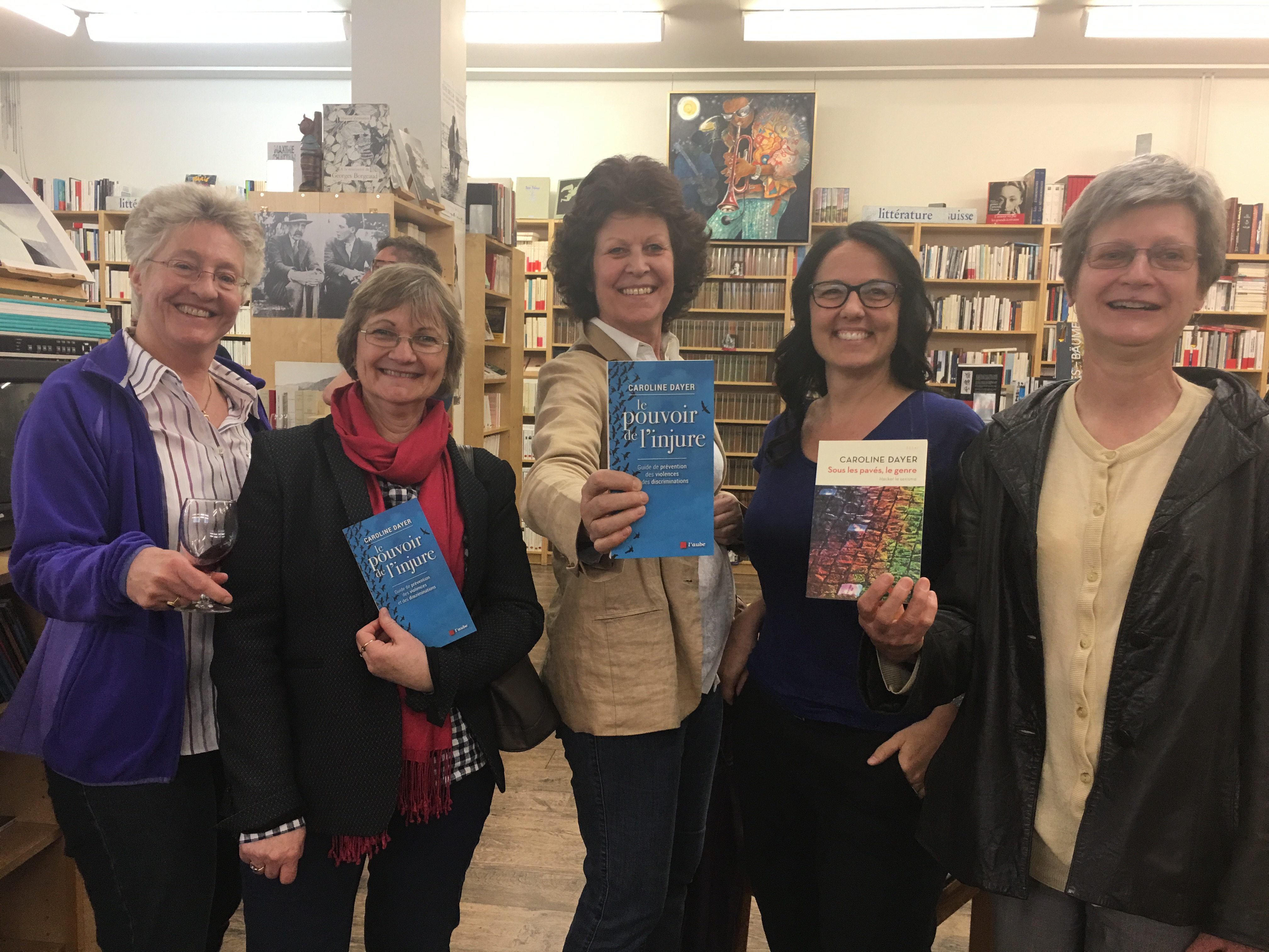 clôture de l'atelier des sans pagEs à Sion à la librairie la Liseuse dans le Valais (Suisse)le 1er avril 2017 avec Caroline Dayer